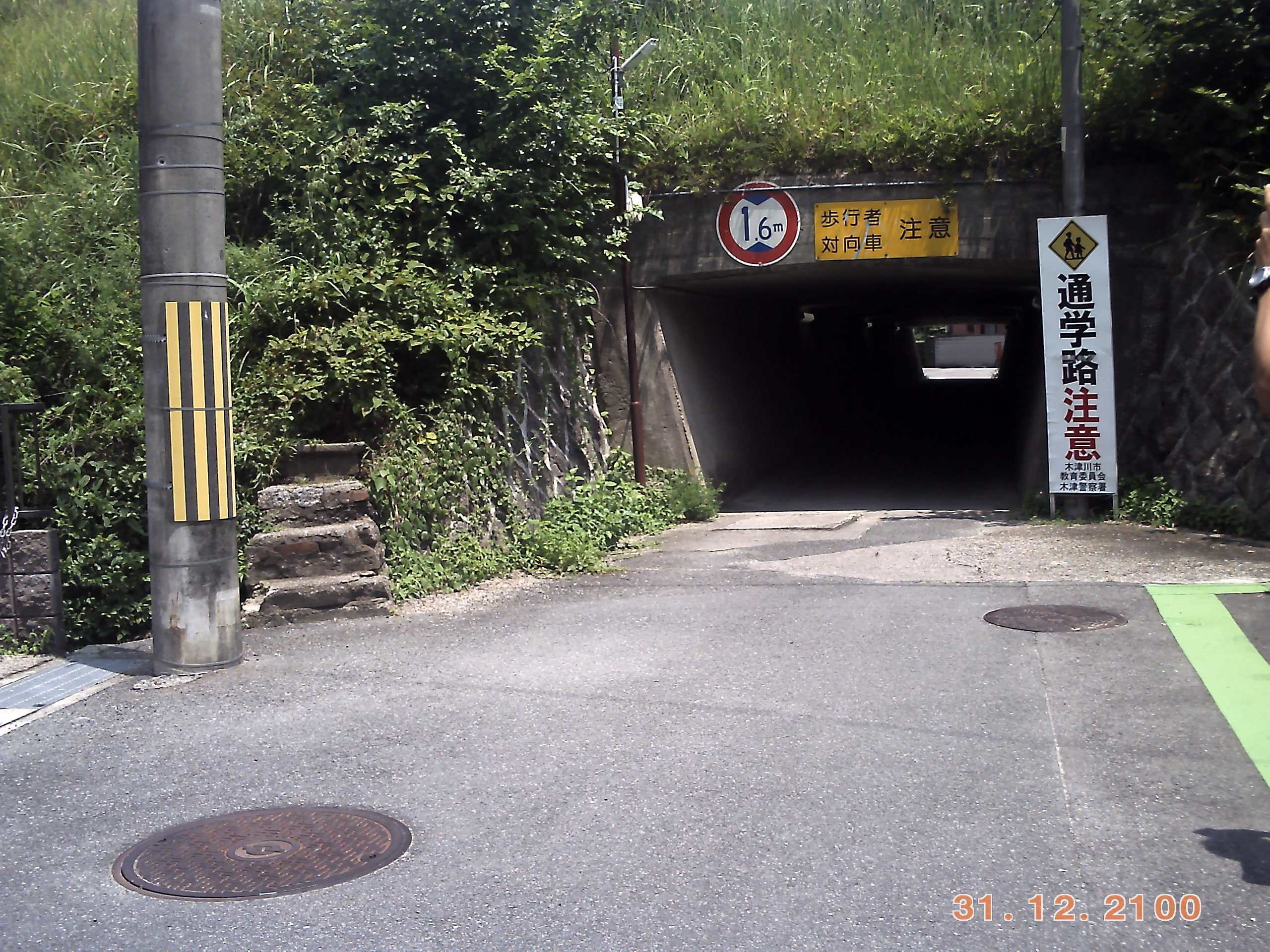 不動川のしたをくぐる道路トンネル。京都府木津川市。